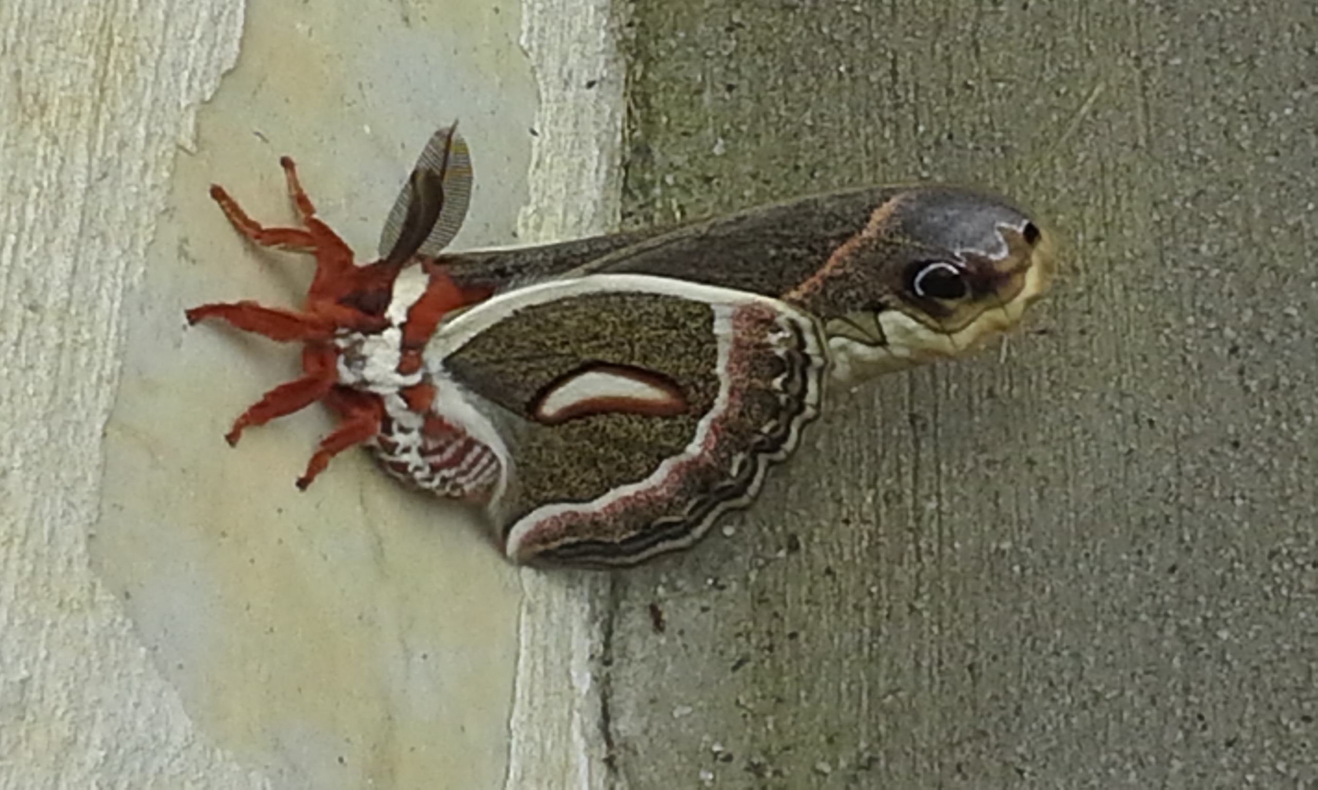 Hyalophora cecropia. View at an angle.